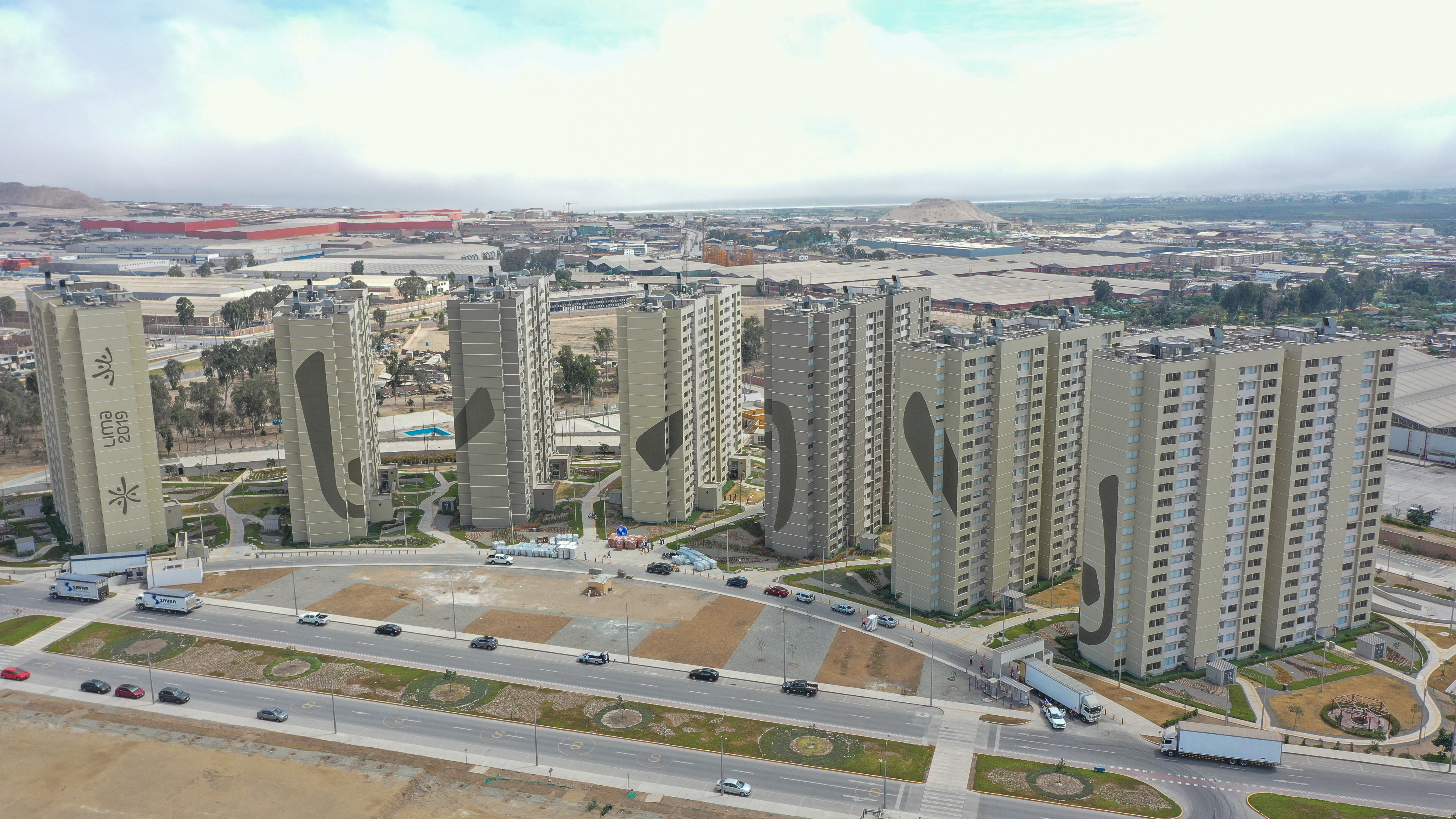 FFAA APOYAN EN IMPLEMENTACIÓN DE VILLA PANAMERICANA PARÁ PACIENTES CON COVID-19